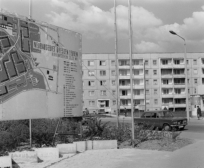 Original image description from the Deutsche FotothekDresden-Leuben. Wohnkomplex, mit Informationstafel über das Bauvorhaben